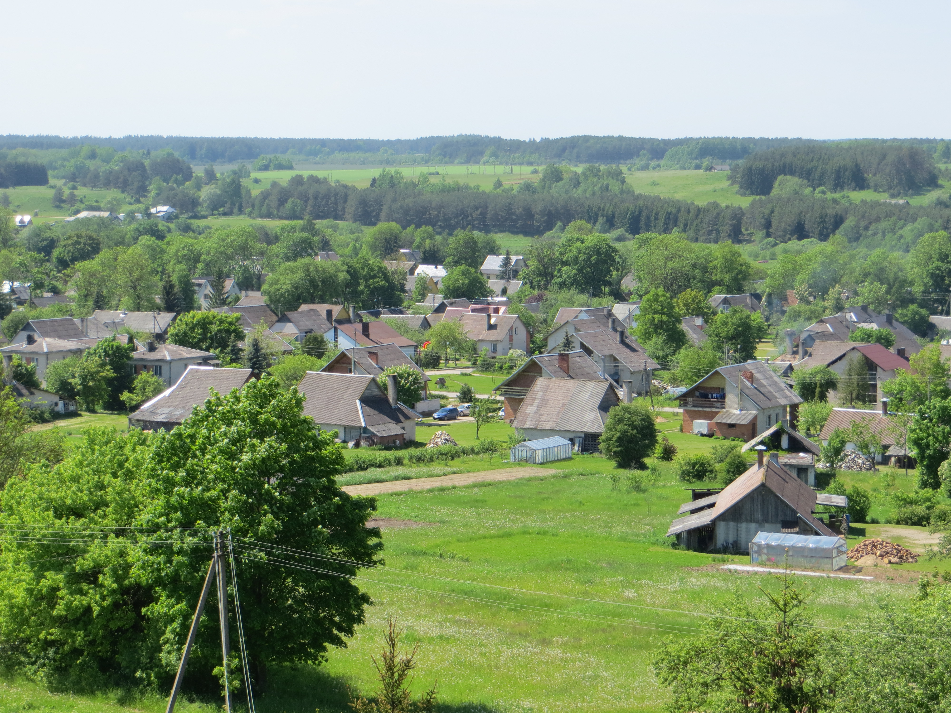 Užpaliai, Lithuania